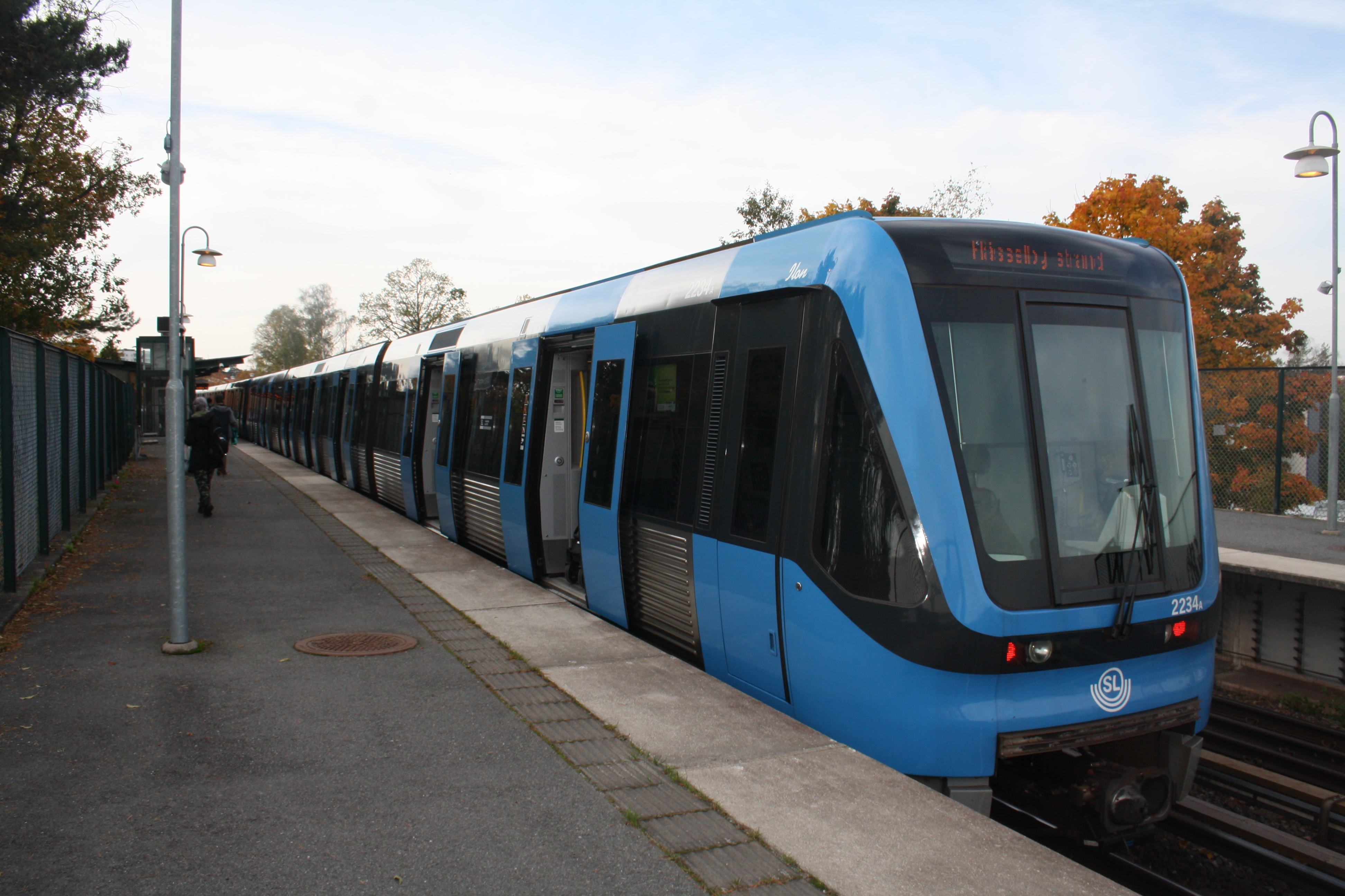 Johannelund tunnelbana